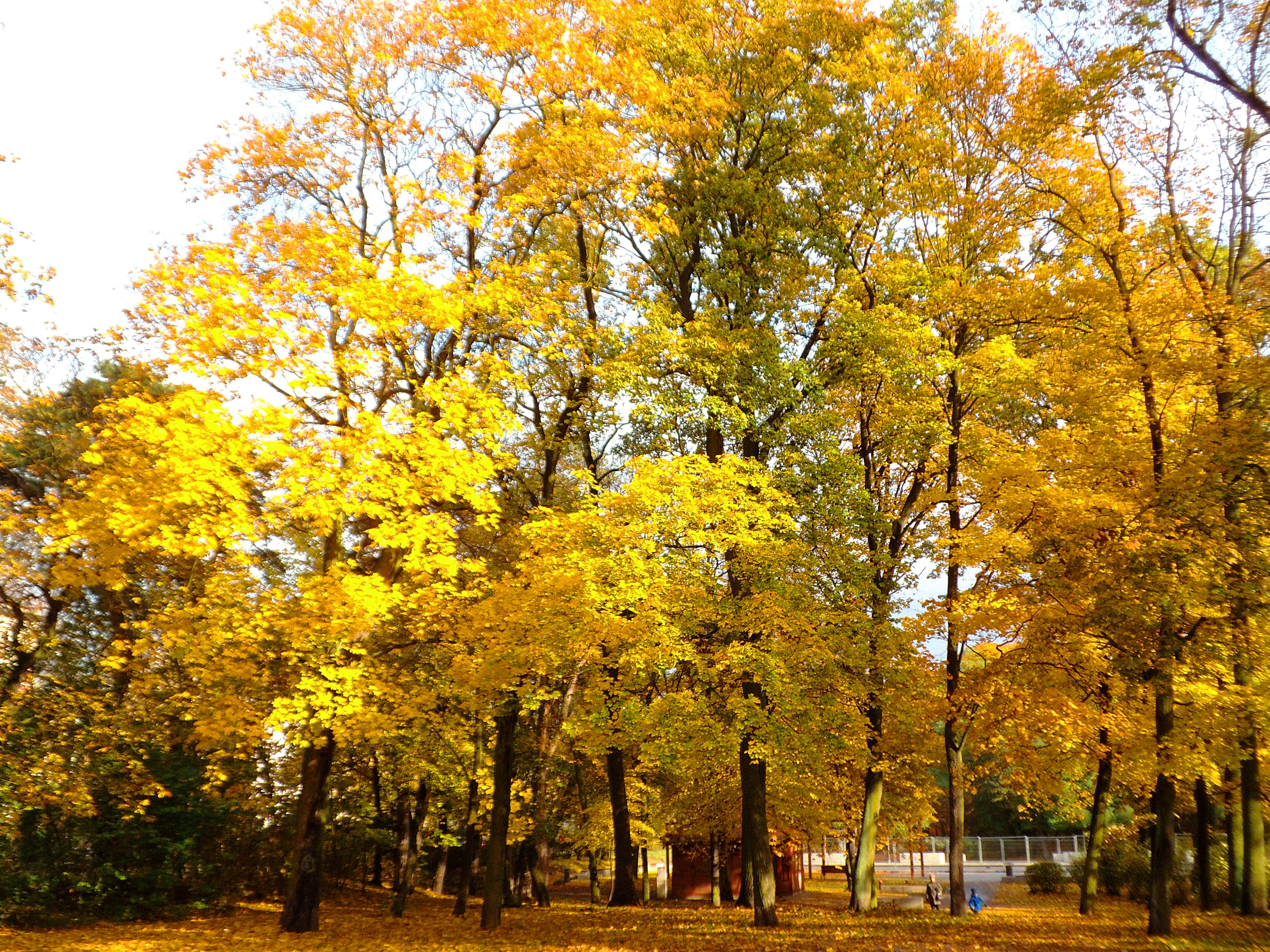 Park Miejski, jesień 2017